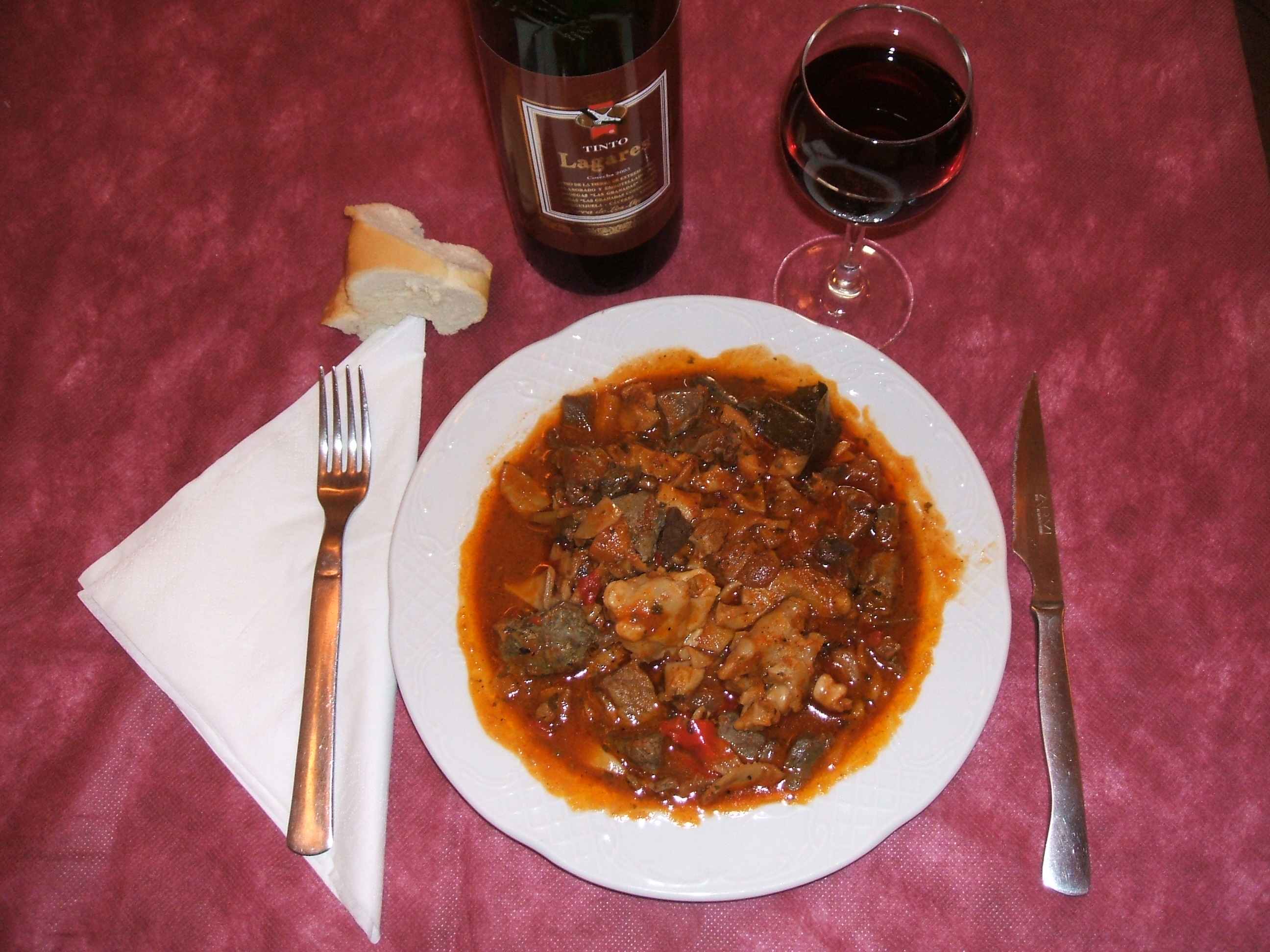 En Navas del Madroño (Cáceres) un plato típico es la chanfaina, elaborado a base vísceras de cordero o cabrito.